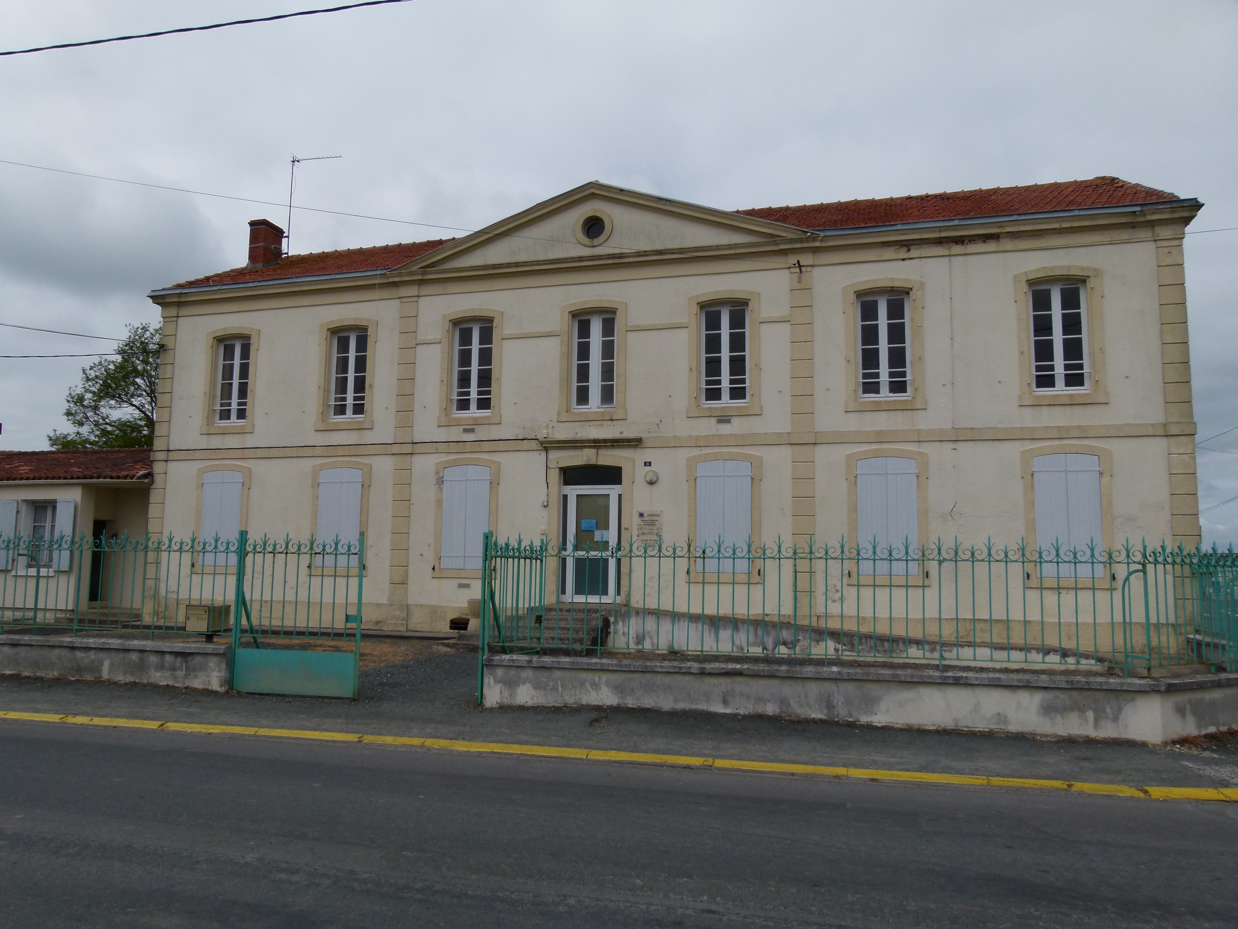 L'ancienne gendarmerie d'Aigrefeuille d'Aunis sur la rue des Marronniers